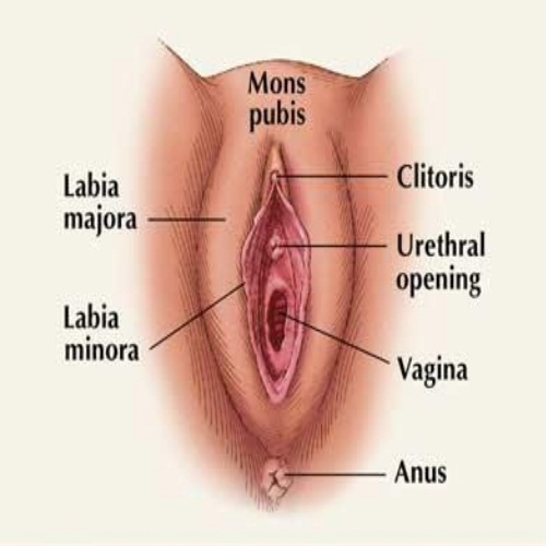 Dibujo de los órganos externos del aparato reproductor femenino